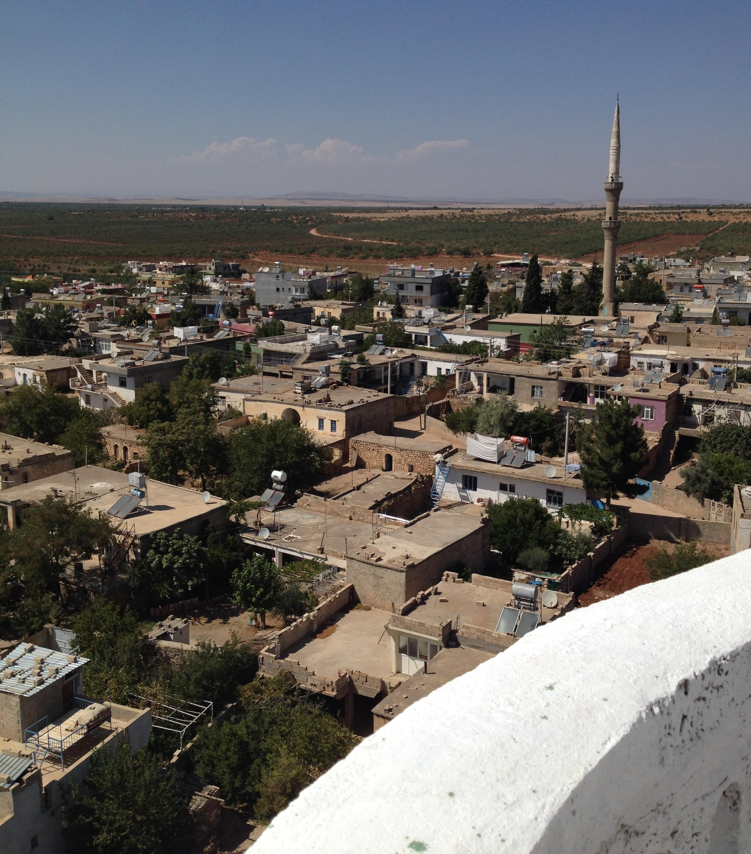 Argıl Kasabası Aşağı Camii'den kasaba